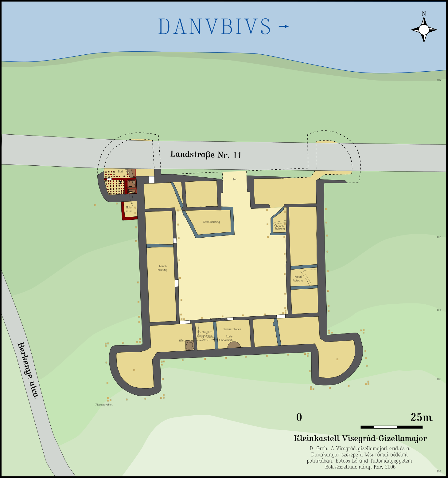 Grabungsbefund des spätantiken Kastells Visegrád-Gizellamajor am ungarischen Donauknie. 1. Ausbaustufe ohne spätere Umbauten. Zusammengesetzt aus mehreren Grabungsplänen. Hauptquelle: Dániel Gróh, Péter Gróf: Visegrád Gizellamajor fortlet. In: Zsolt Visy (Hsgr.): The Roman army in Pannonia. Teleki Lázló Foundation 2003. ISBN 963-86388-2-6. S. 91.